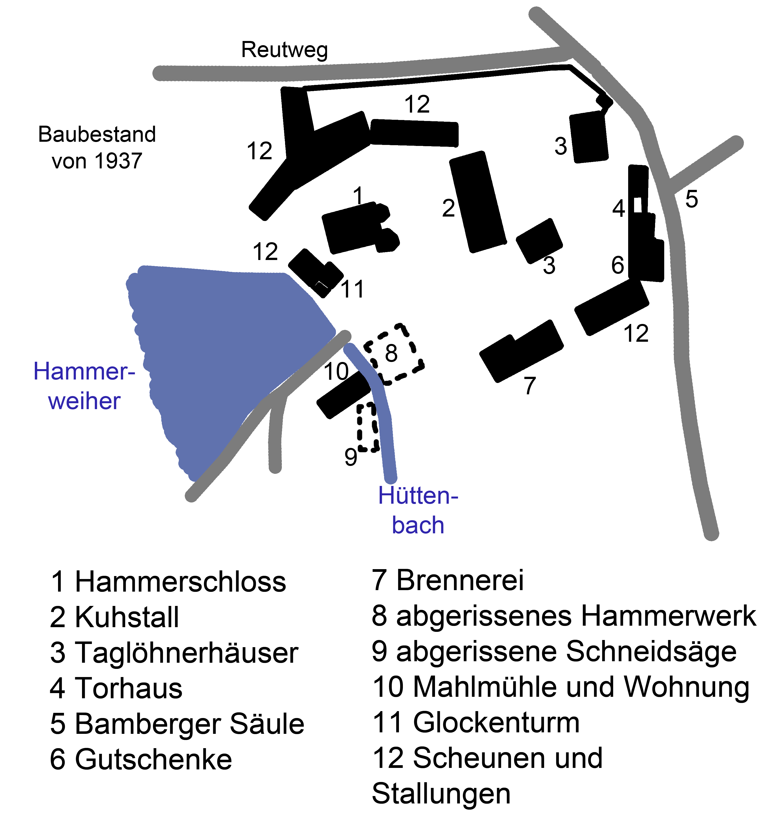 nicht detailgetreuer Lageplan der Gebäude im Gutshof von Altenweiher. Quelle sind ein Plan vom Umleitungskanal sowie Fotos aus den 1920er und 1930er Jahren. Stand der Bebauung ist etwa 1937, wobei an der Nordmauer eine Scheune fehlen könnte.